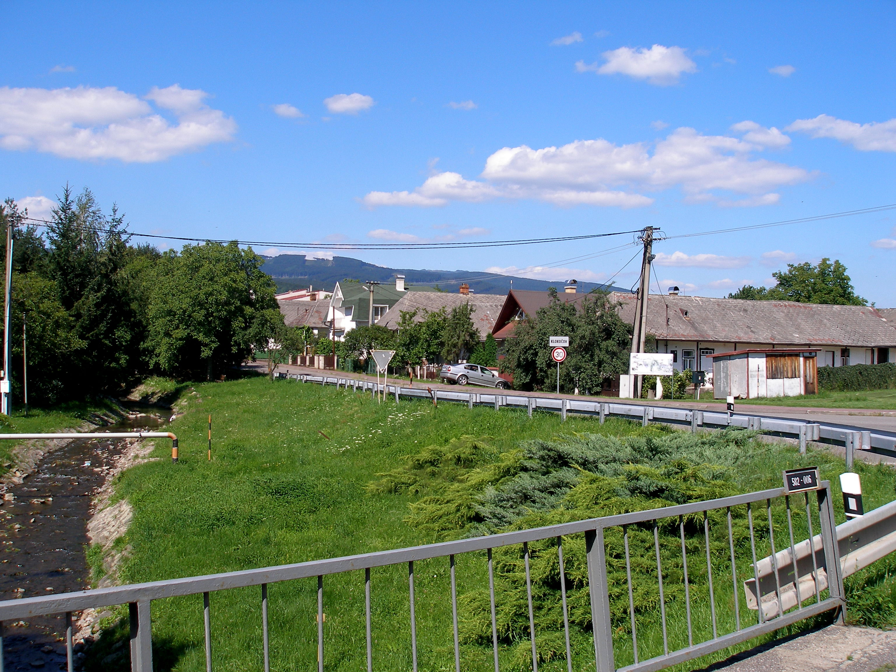 Obec Klokočov okres Michalovce.